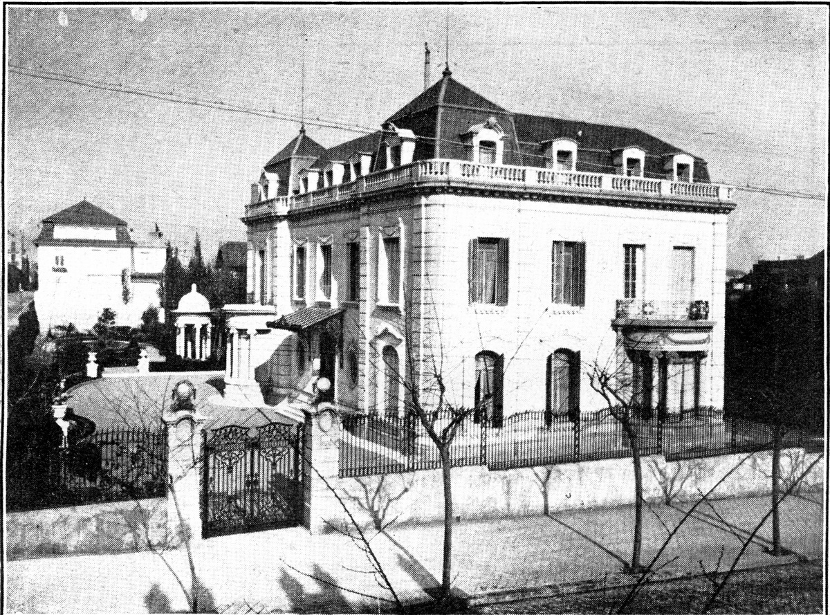 Xalet d'Araceli de Fabra al carrer de Muntaner 264(Barcelona, Catalunya). Obra de Miquel Madorell i Rius de 1914. Va desaparèixer als anys 1960-70.